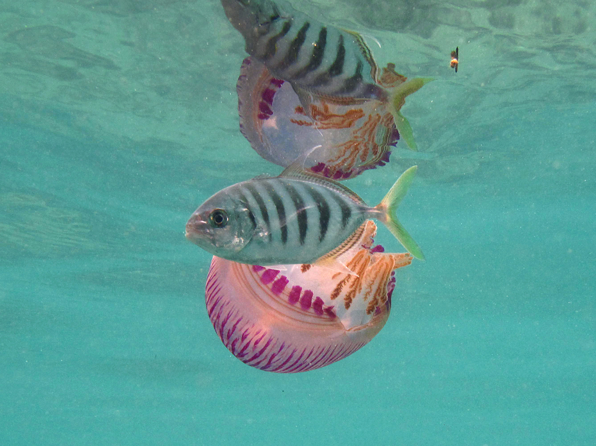 Une carangue rayée (Carangoides ferdau) avec sa méduse Thysanostoma loriferum à la Réunion.